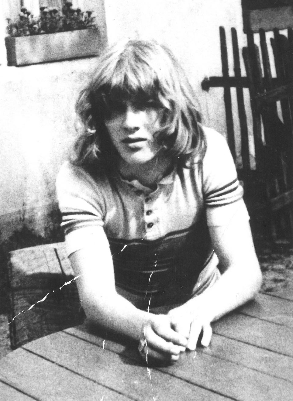 Karsten Dümmel, aufgenommen im Jahr 1976